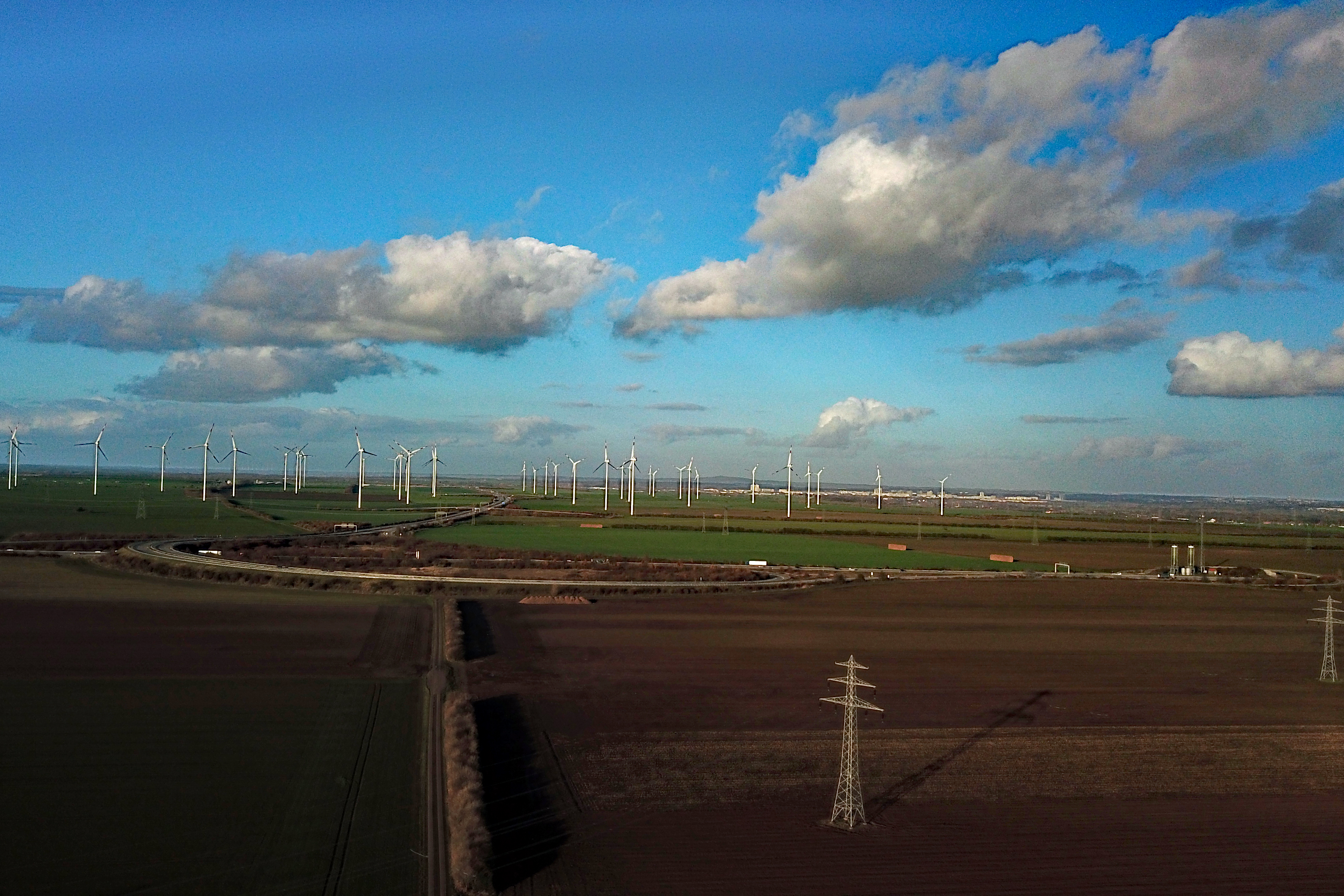 Autobahndreieck Halle-Süd (links und rechts A 38, nach oben A 143), Saalekreis; vorne 110-kV-Freileitung, hinten Windpark Große Schanze bei Holleben